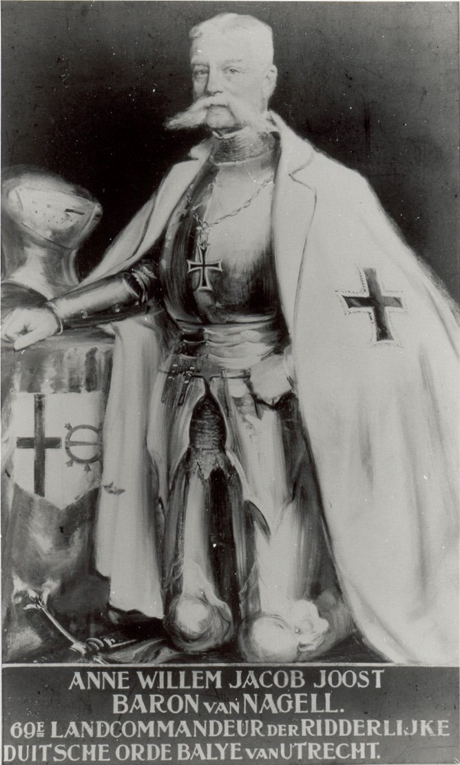 Portrait of Anne Willem Jacob Joost van Nagell (1851-1936)